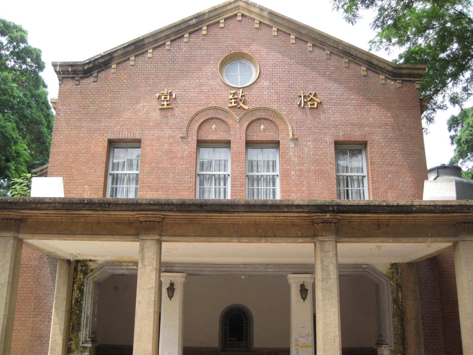 成功大學格致堂